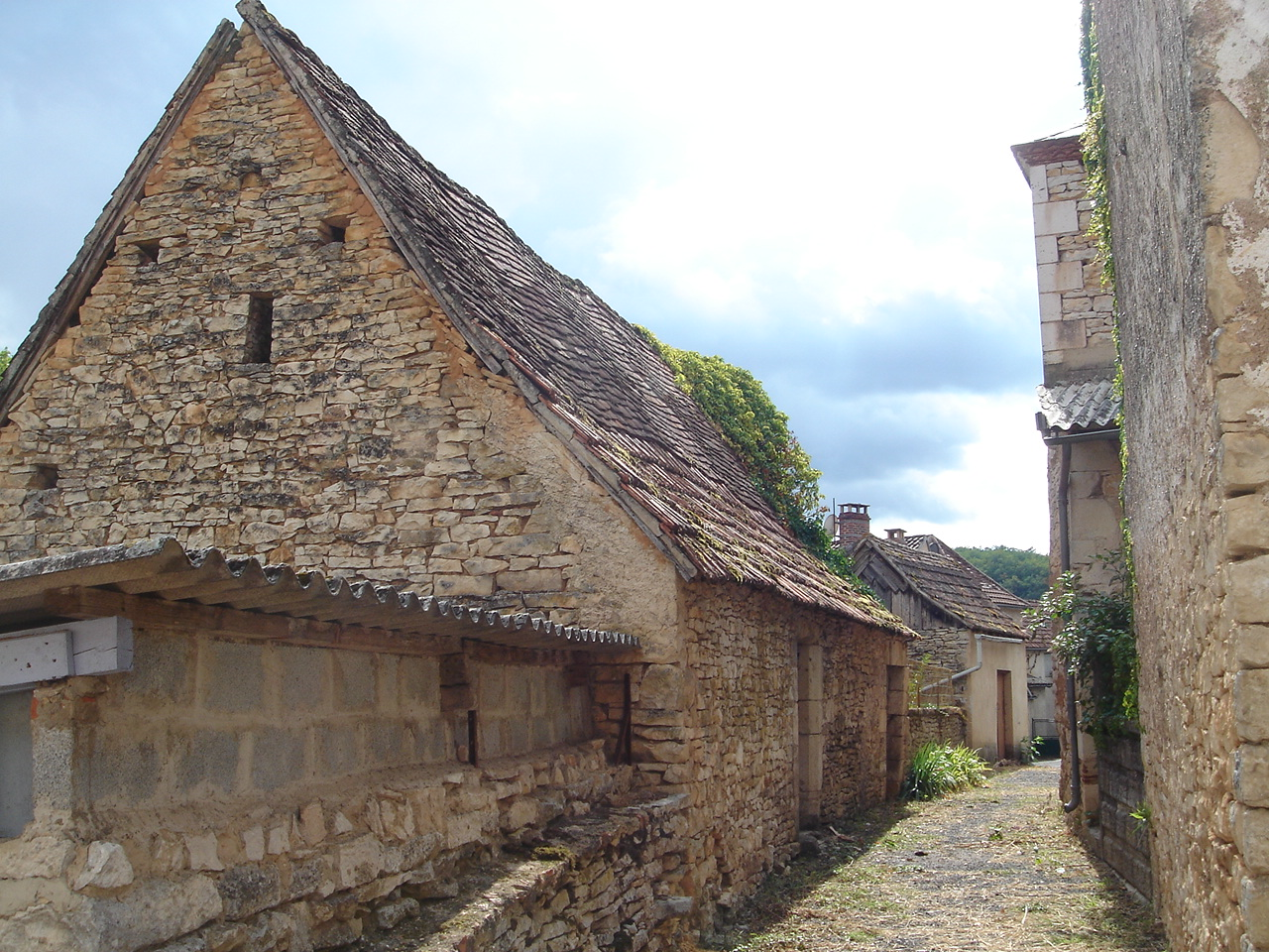 Dorfstraße in Sainte-Eulalie-d'Ans, einem 200-Seelen-Dorf zwischen Périgueux und Hautefort.